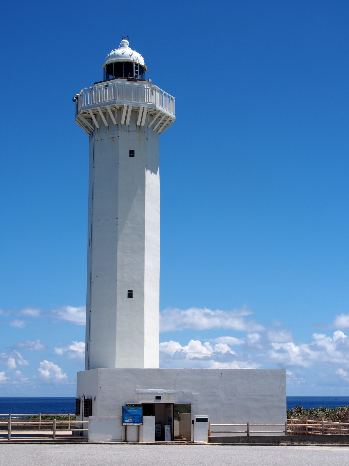 宮古島の東平安名崎にある灯台。